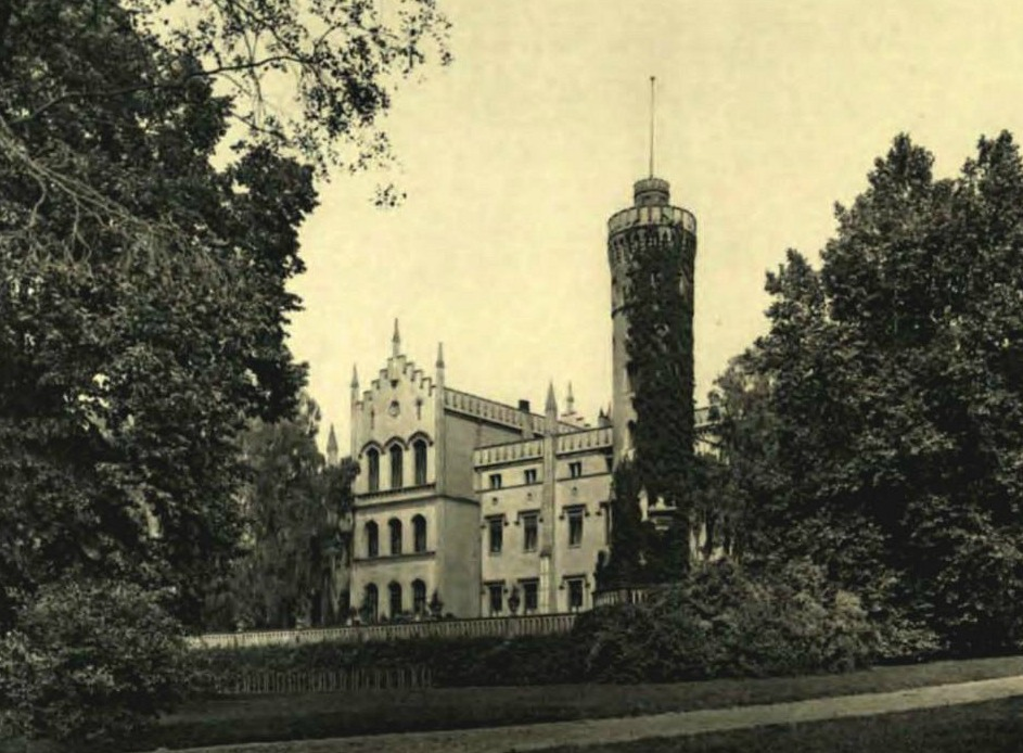 Zdjęcie z 1909